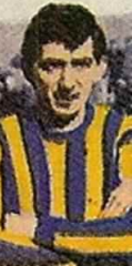 Antonio Manillo, futbolista argentino de Banfield, Rosario Central y Racing Club durante la década de 1960.